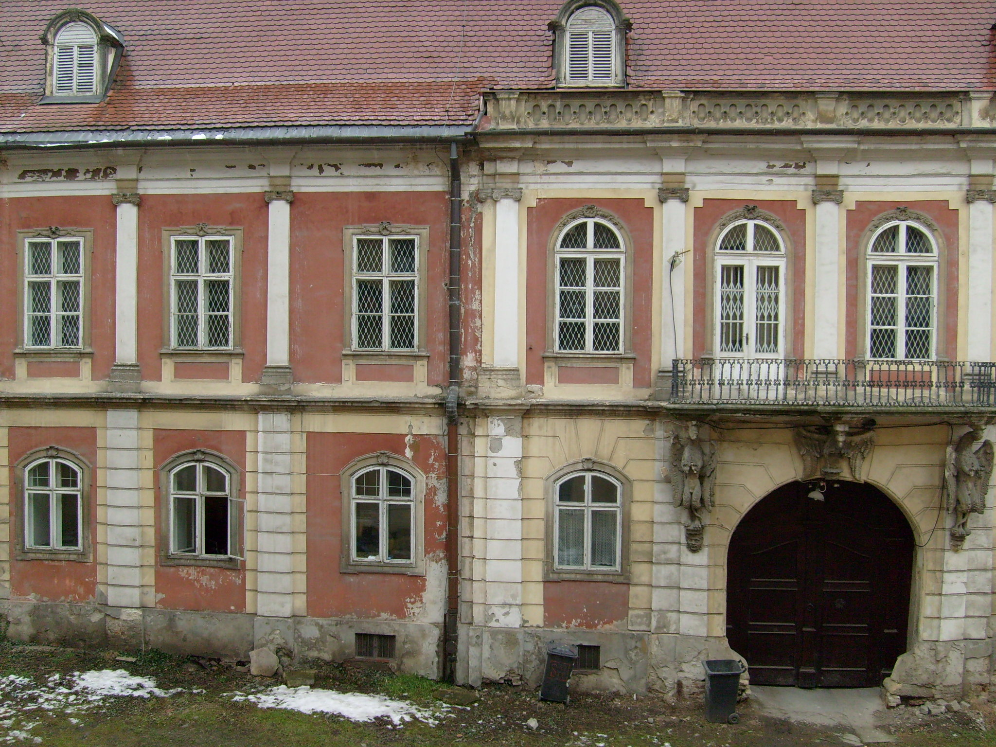 Bánffy Schloß in Klausenburg (Cluj). Ostfassade, mit Greifen (18. Jh.).